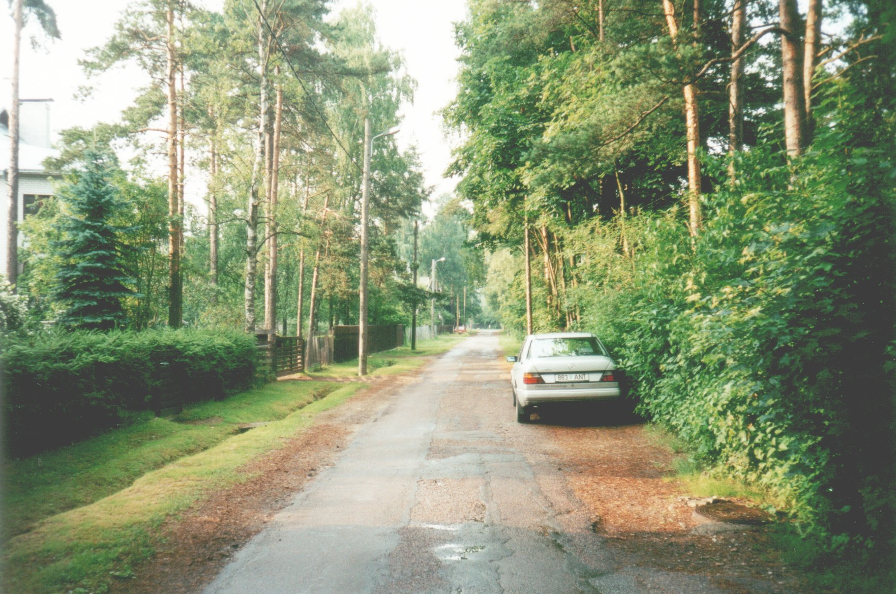 Street in Nõmme, Tallinn, Estonia